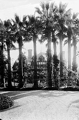 Villa Les Lotus